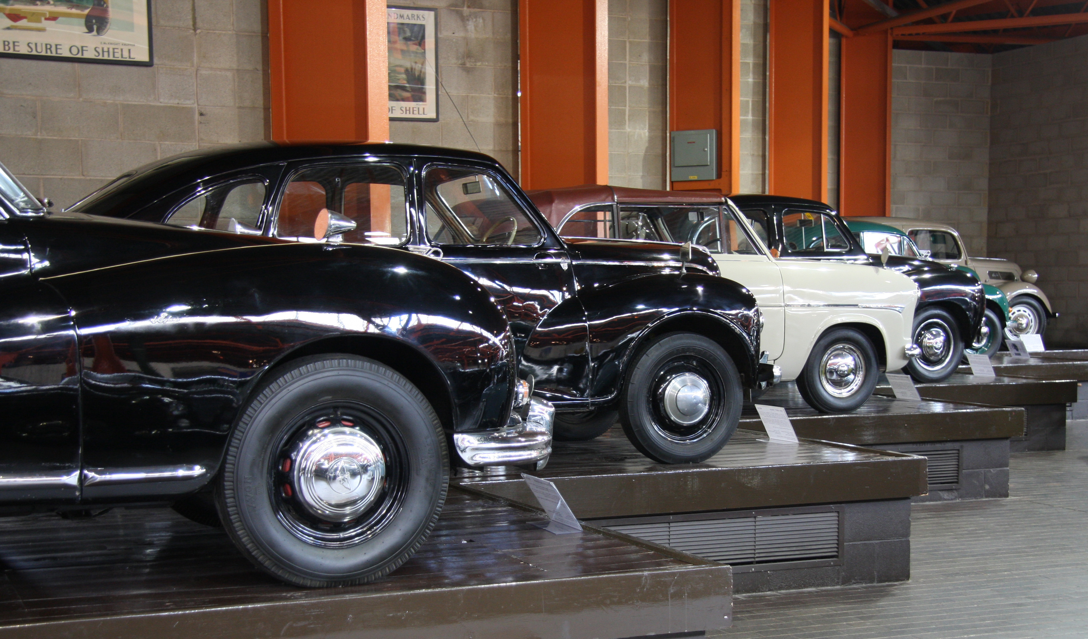 1950s cars